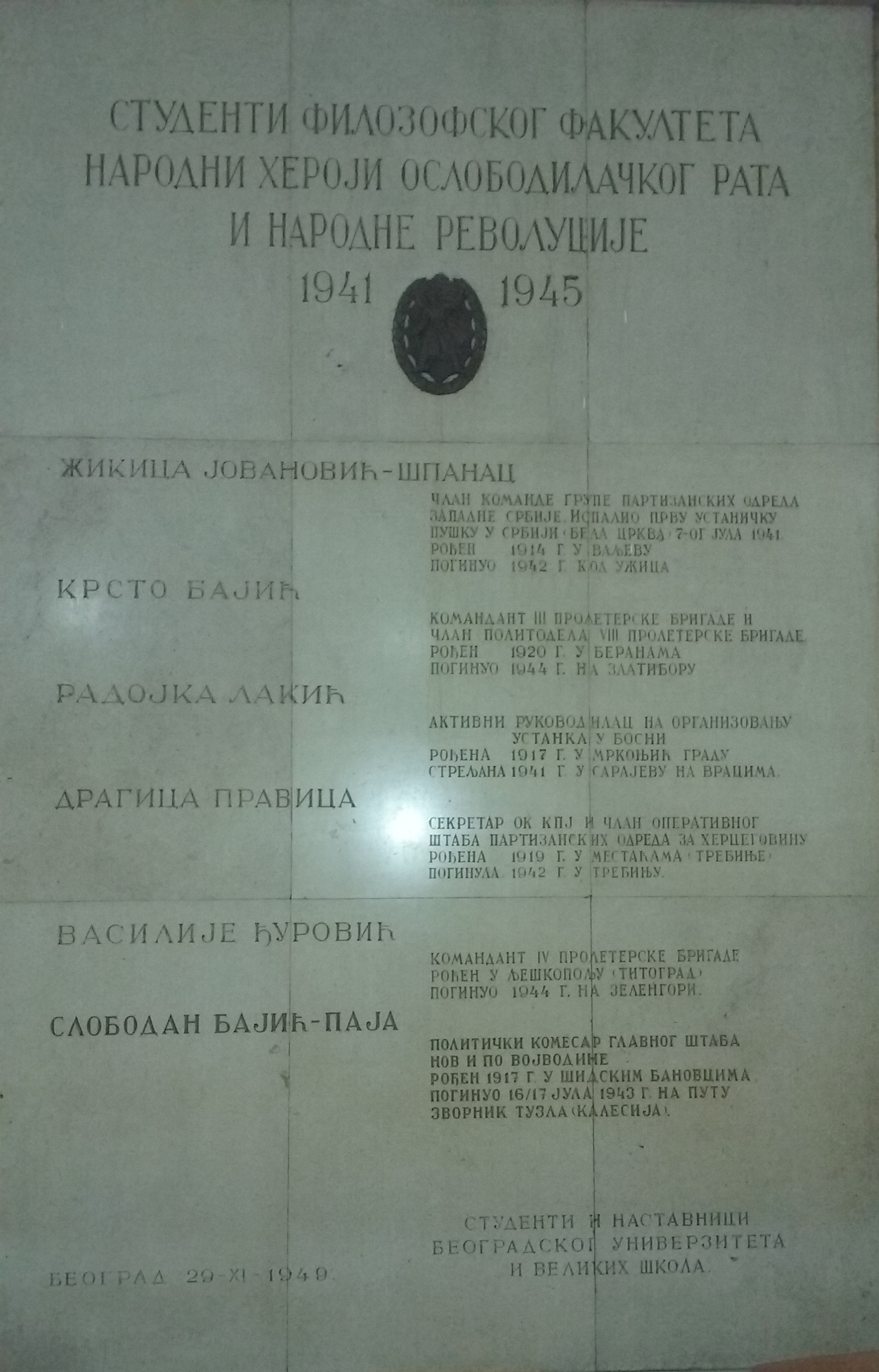 Спомен-плоча народним херојима погинулим у НОР у згради Филозофског факултета у Београду.